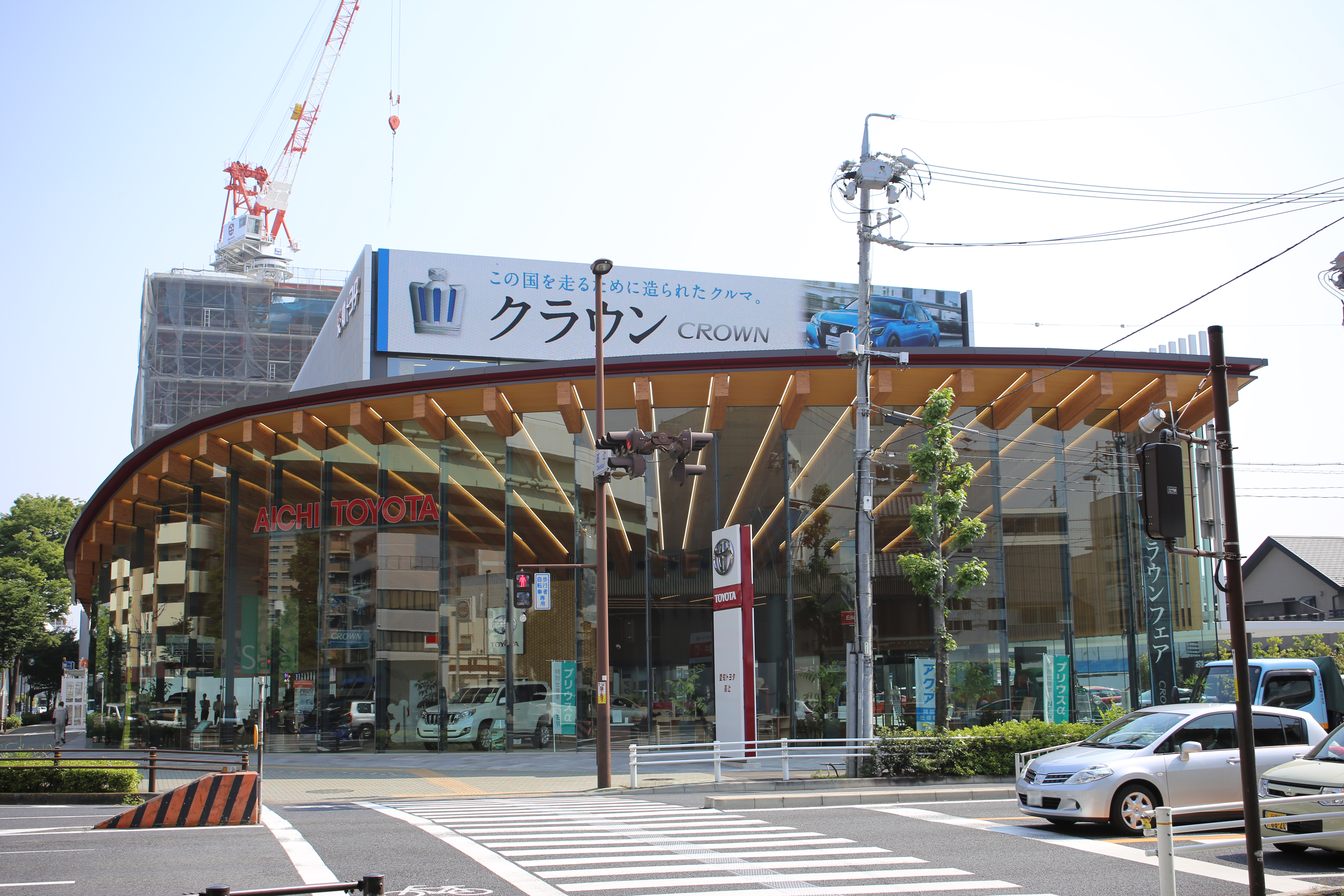 名古屋市昭和区高辻町の愛知トヨタ本社を北側公道東側より撮影